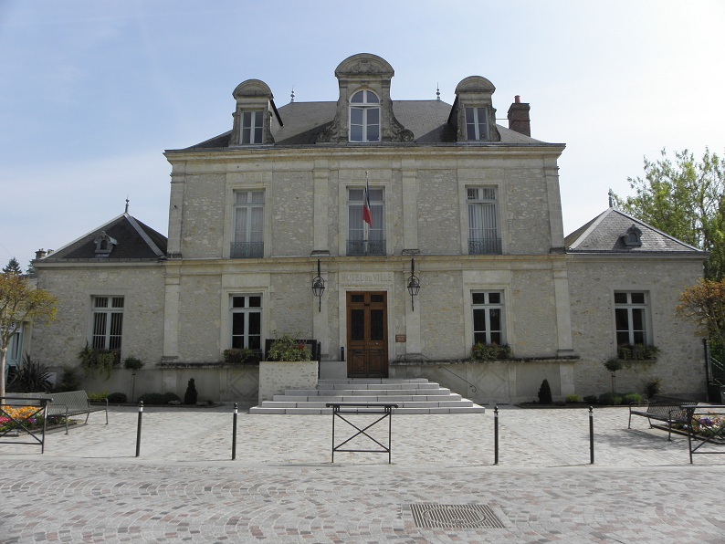 Mairie de La Ferté-Bernard (72).